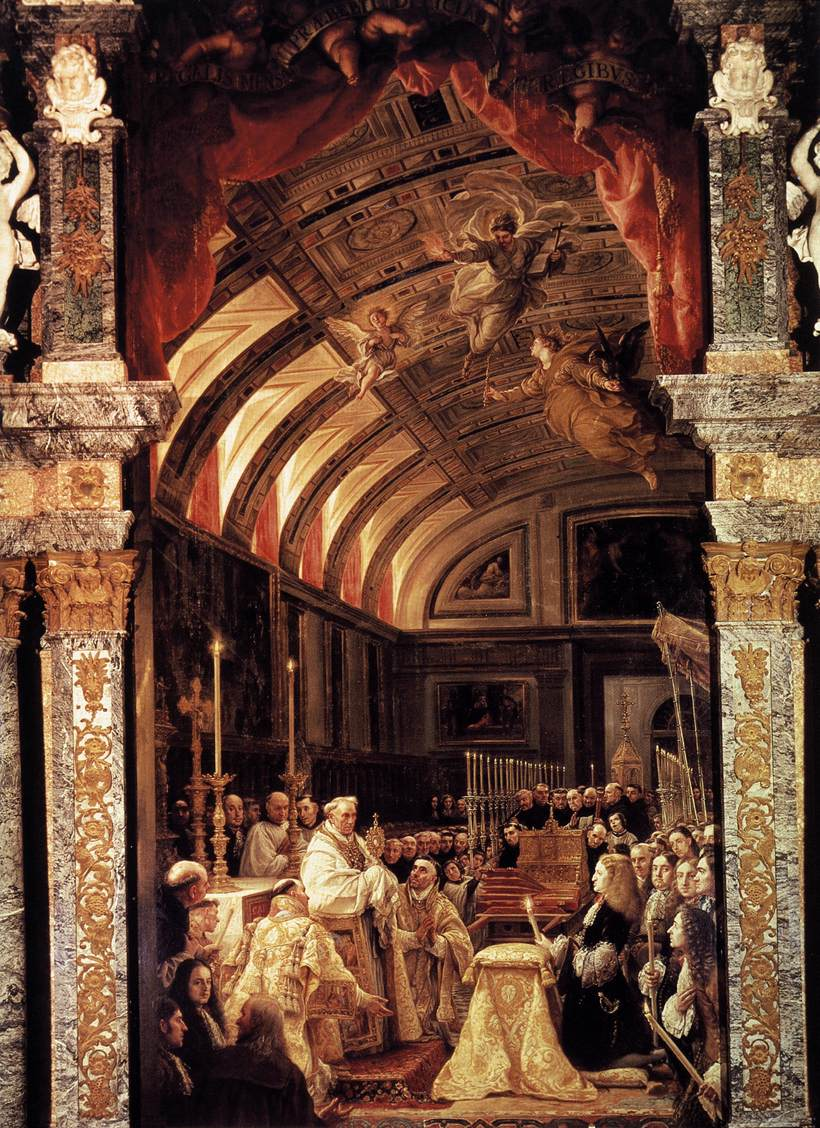 El lienzo, que se halla en la sacristía del monasterio de San Lorenzo de El Escorial, representa la adoración de la Sagrada Forma, que se halla en el interior de la custodia que sostiene el prelado, por el rey Carlos II de España, que aparece arrodillado ante ella.